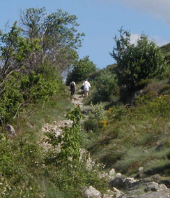 Le GR700 de Villefort (Lozère) vers La Garde-Guérin